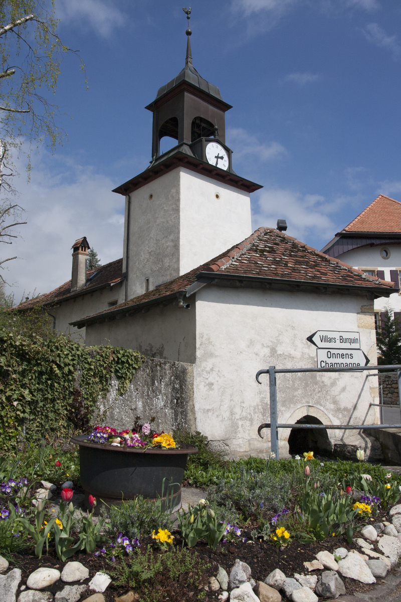 Centre du village de Fontaines-sur-Grandson et son clocher